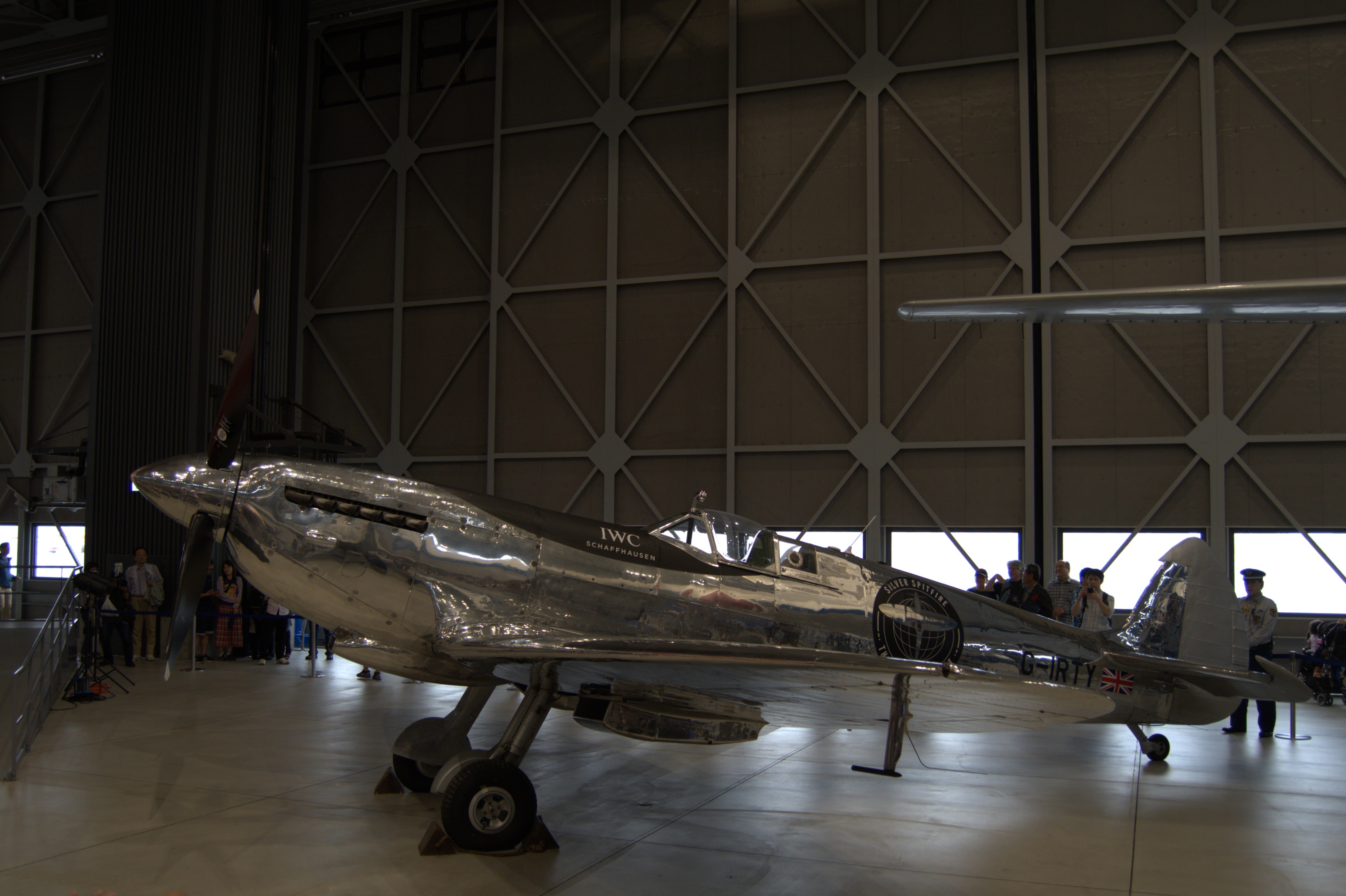 2019年9月に日本へやってきたシルバースピットファイア。10月13日と14日にあいち航空ミュージアムで一般公開された時の写真です。